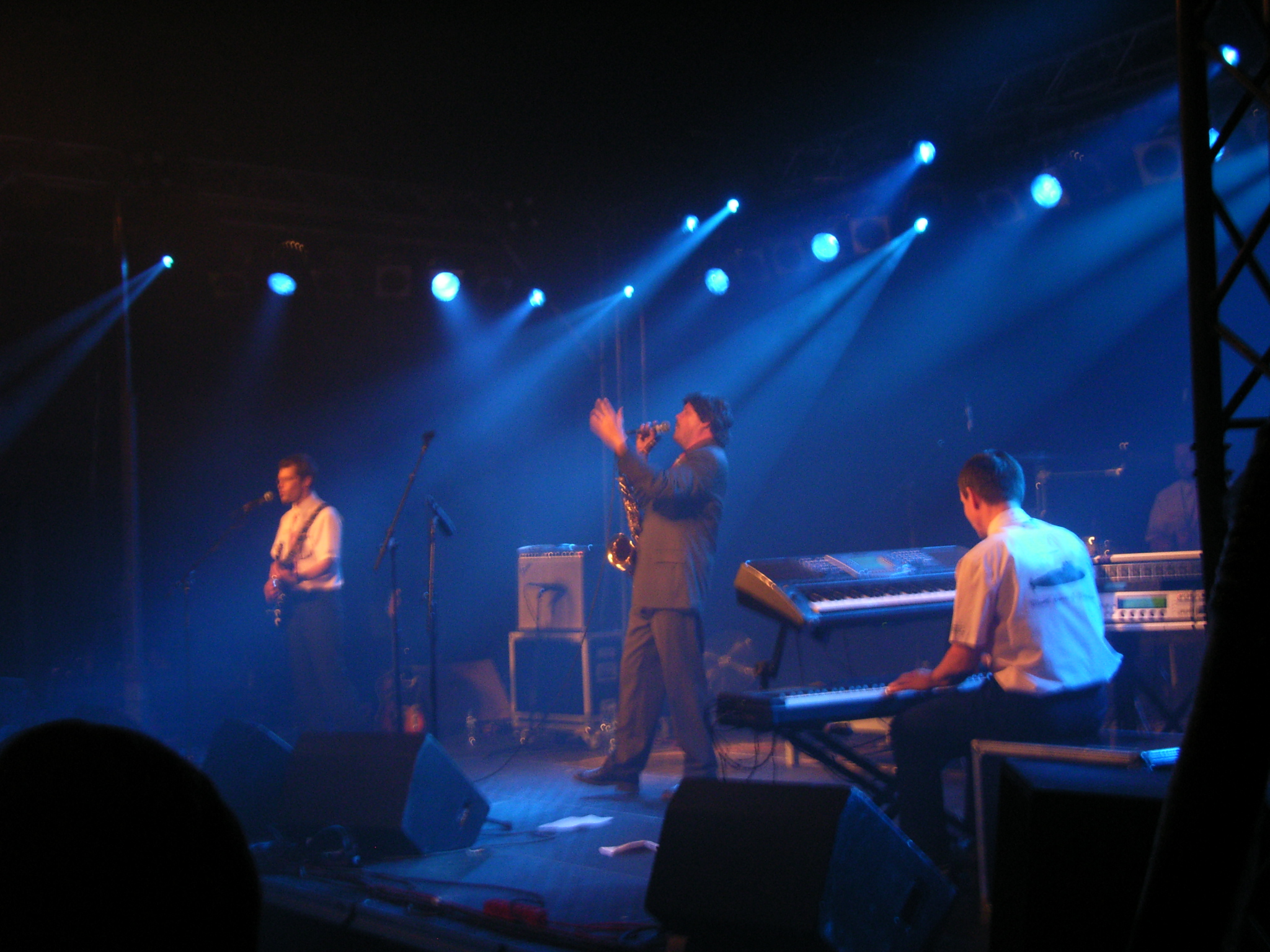 Mainio päätös illalle ja festivaalille. Kuulijakunta oli aikalailla eri kuin esim Apiksen keikalla, mistähän johtuu.